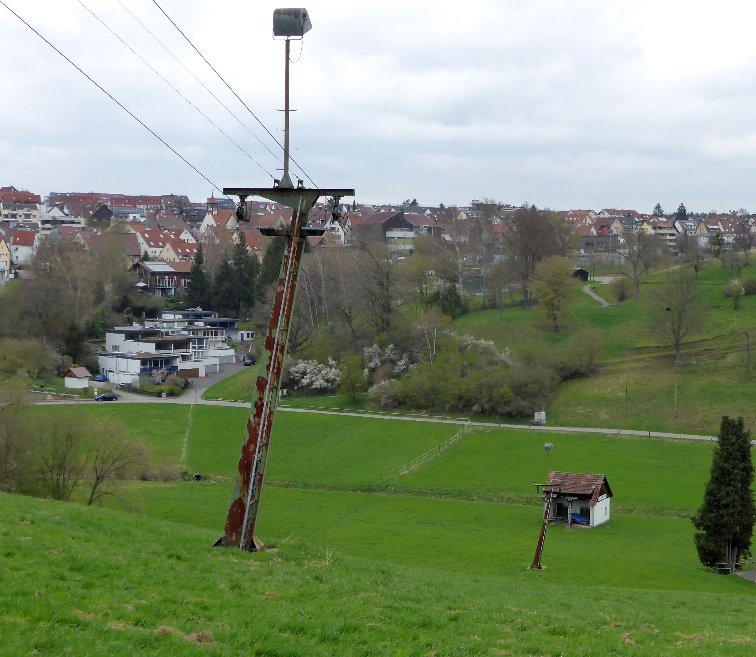 De restanten van de Piz Mus skilift naast de Obere Mühle nabij Musberg in het Siebenmühlental (Stuttgart)